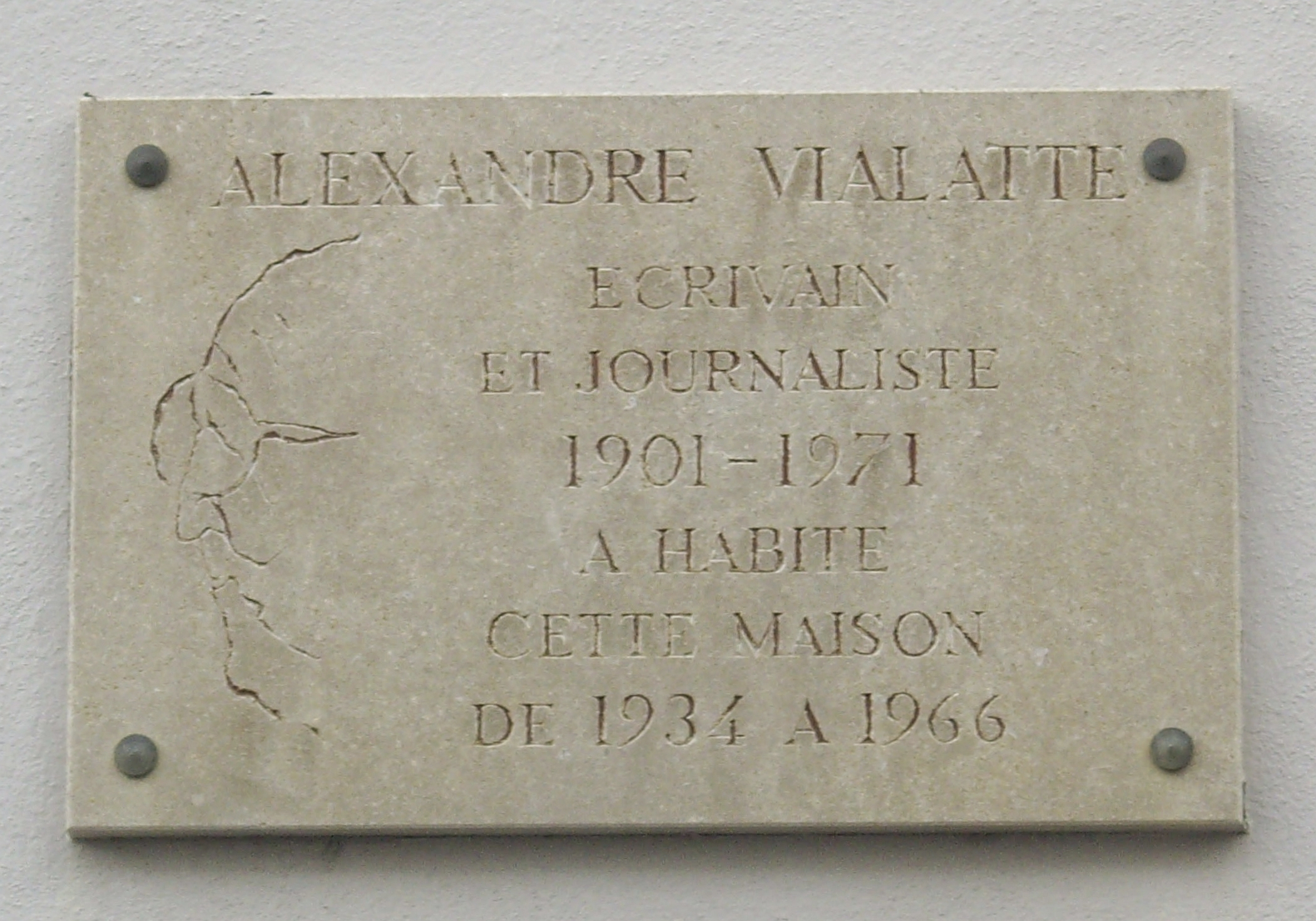 Plaque commémorative, 158 rue Léon-Maurice-Nordmann, Paris 13e. « Alexandre Vialatte, écrivain et journaliste, 1901-1971, a hébité cette maison de 1934 à 1966. »